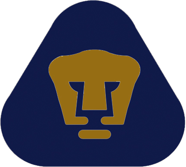 Club Universidad Nacional Logo